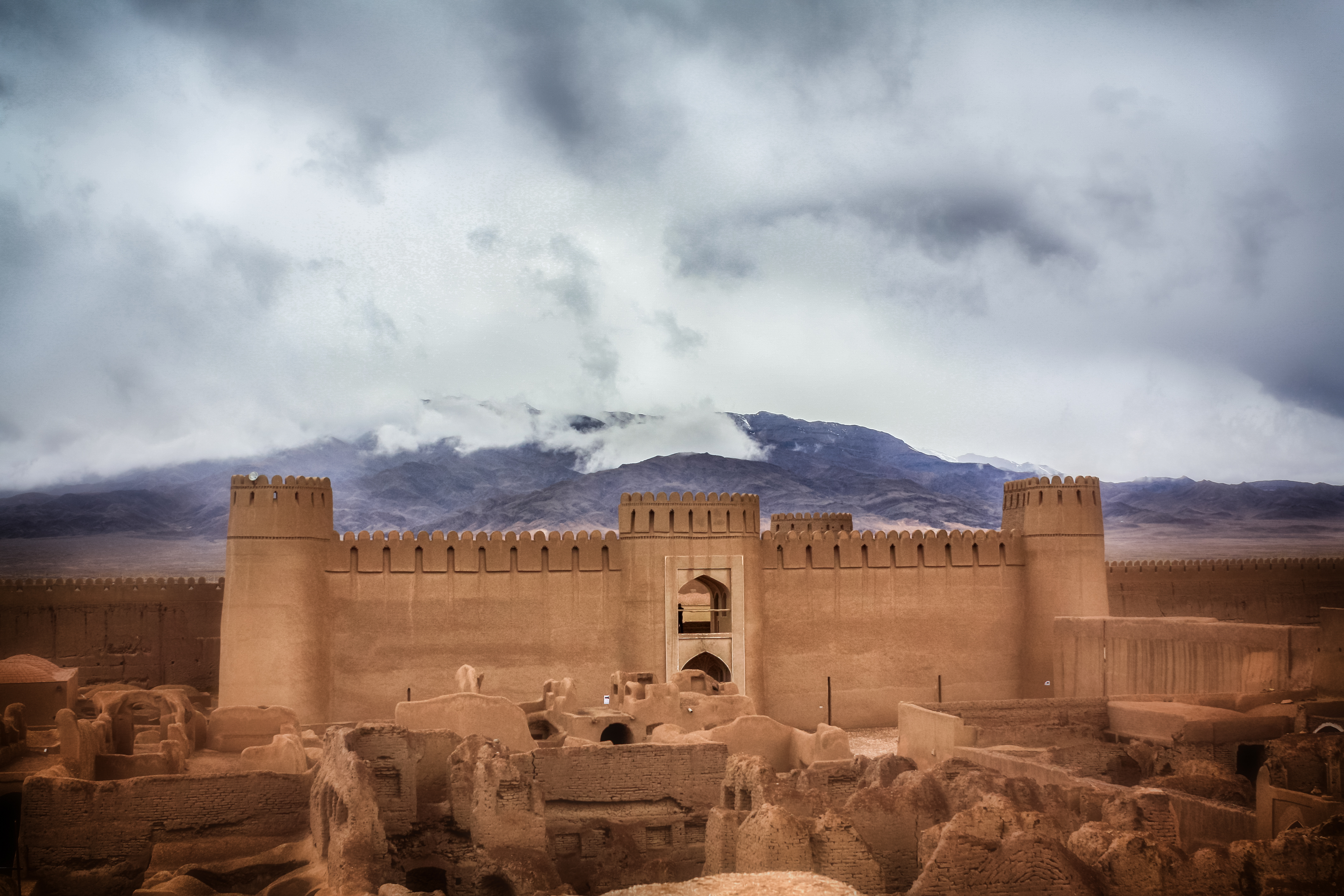 ارگ راین